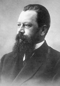 Ширинский-Шихматов, Андрей Александрович (1868—1927)